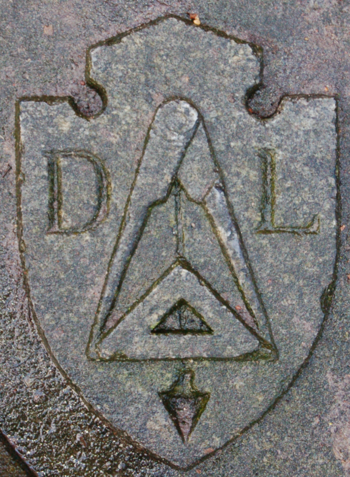 Das Zunftwappen von Architekten Detlef Lienau (* 17. Februar 1818 Uetersen; † 29. August 1887 New York)